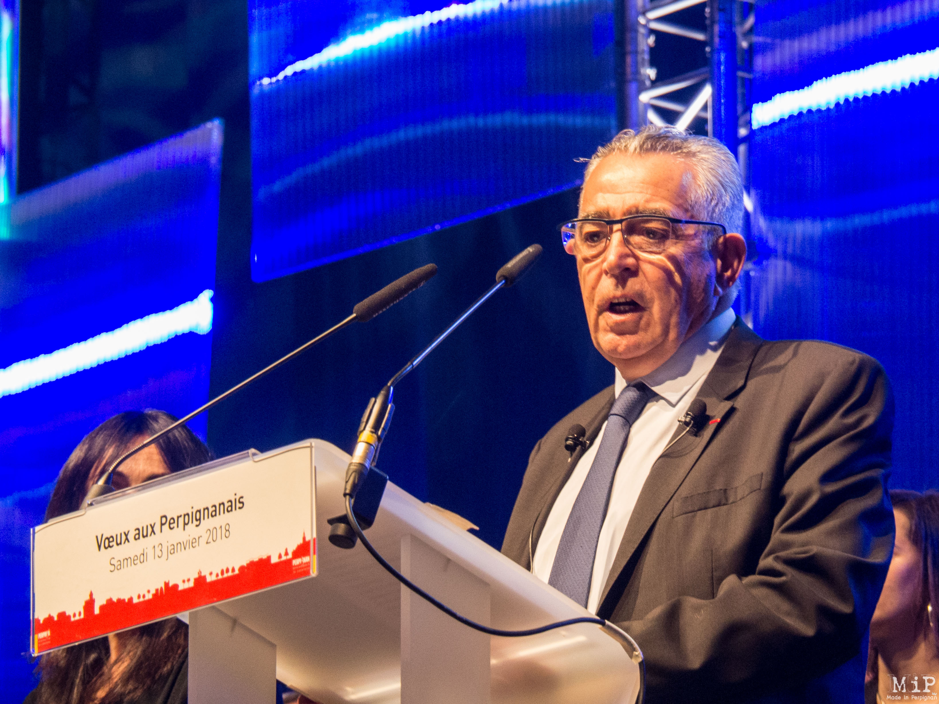 Janvier 2018 vœux à la population - Jean Marc Pujol, maire de Perpignan